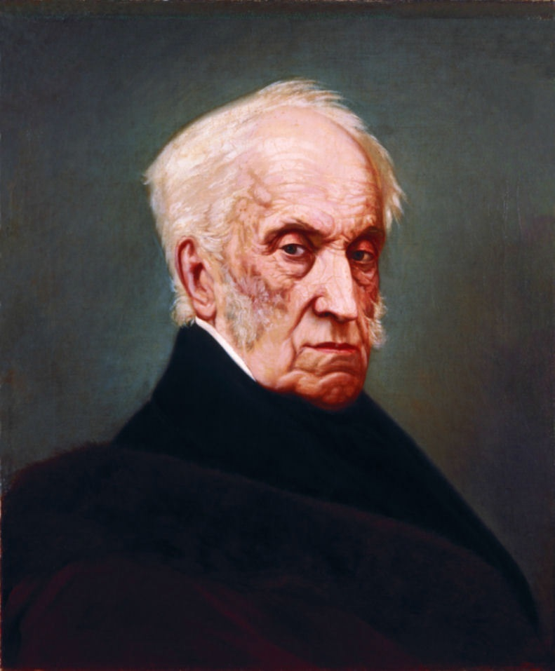 Prince Adam Jerzy Czartoryski, oil